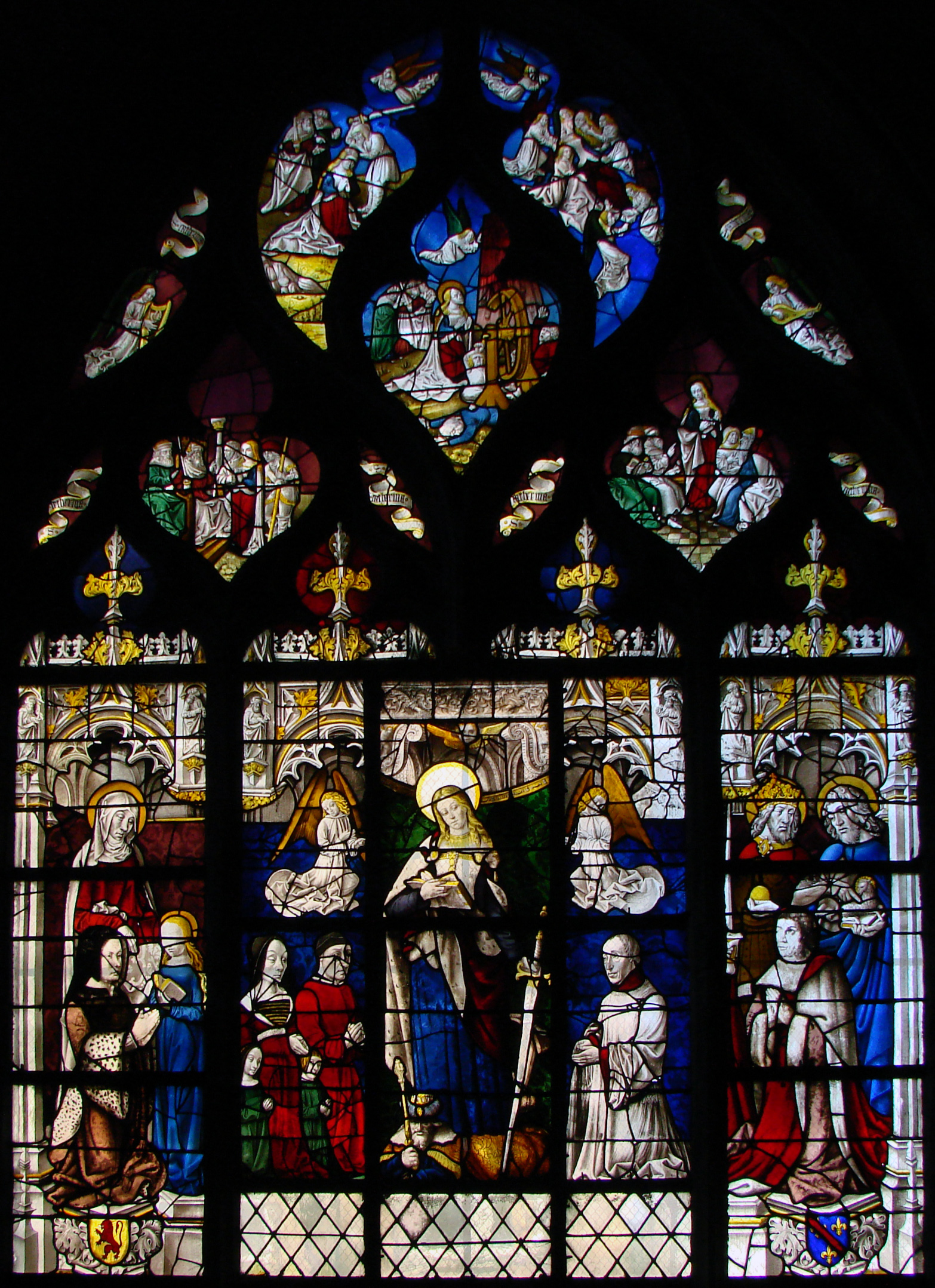 Basilique-cathédrale Notre-Dame de l'Annonciation de Moulins; vitrail de Sainte Catherine, dit vitrail des ducs, fin du 15ème siècle.